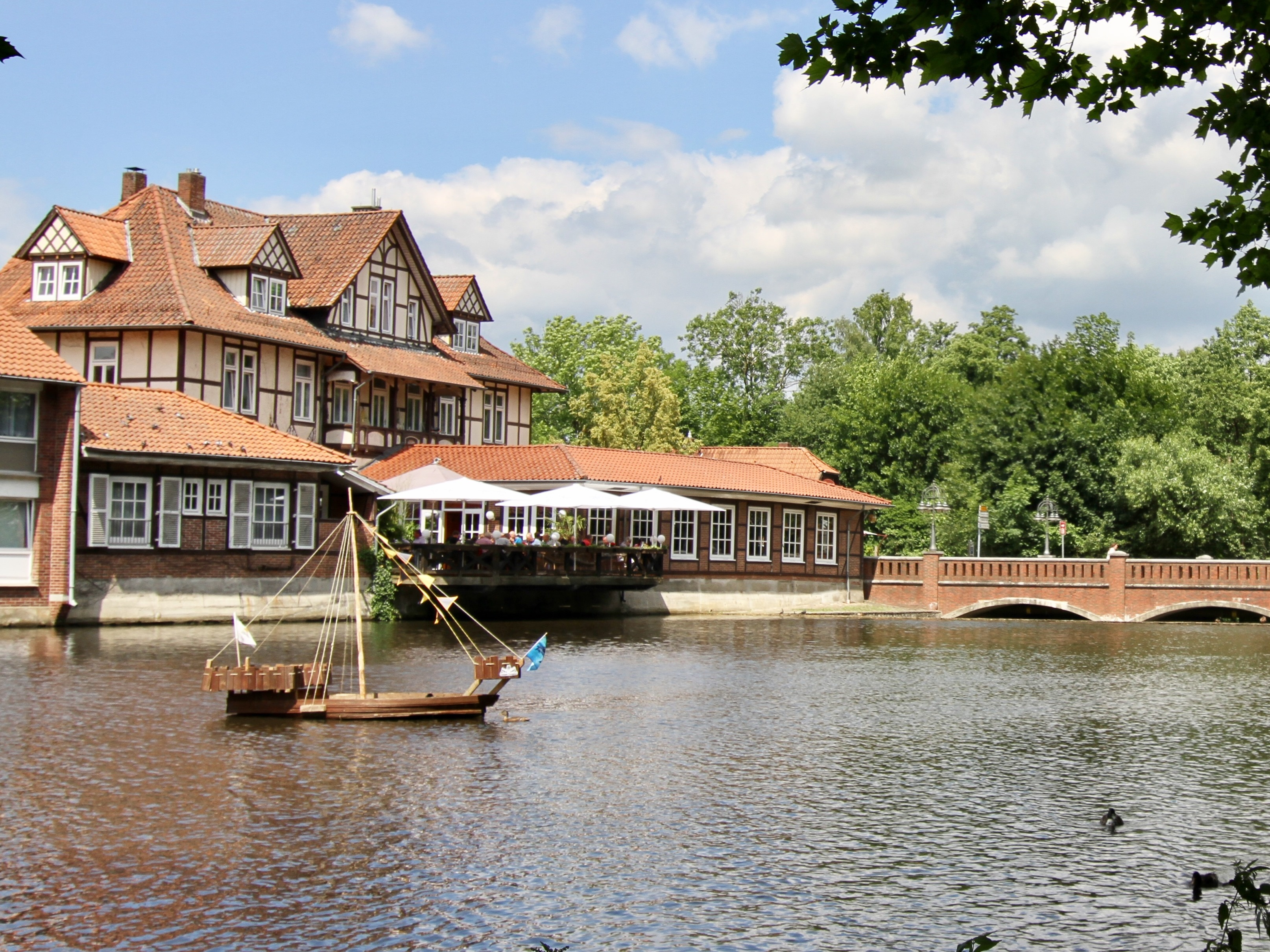 Modell einer Hansekogge auf dem Uelzener Ratsteich